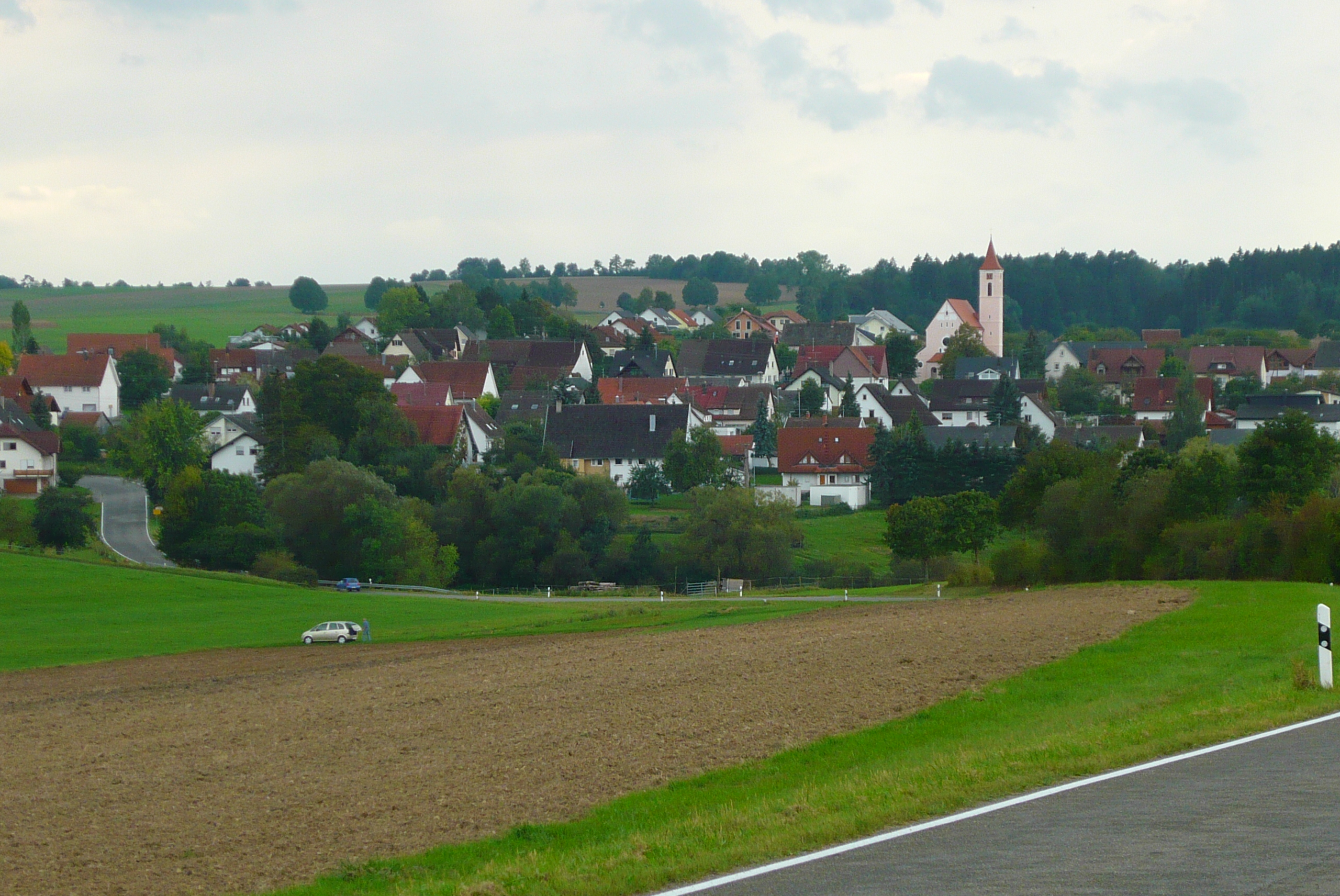 Harthausen bei Epfendorf, Kreis Rottweil The village Harthausen in the County of Rottweil near Epfendorf